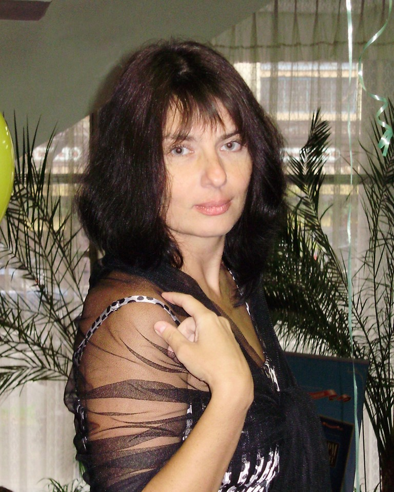 Портрет Угрюмової Вікторії Іларіонівни